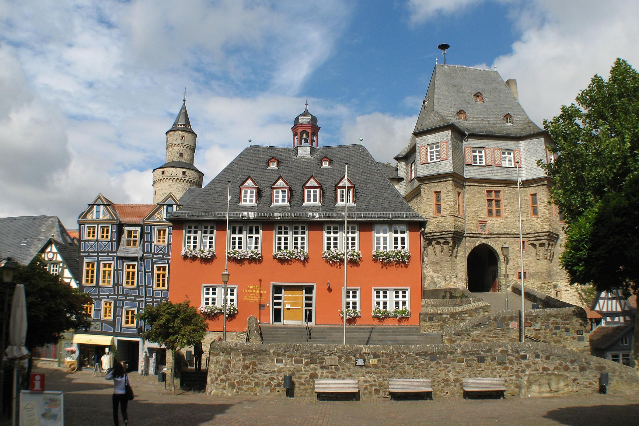 Rathaus Idstein, rechts im Bild das Torbogengebäude, links ist der Hexenturm zu erkennen